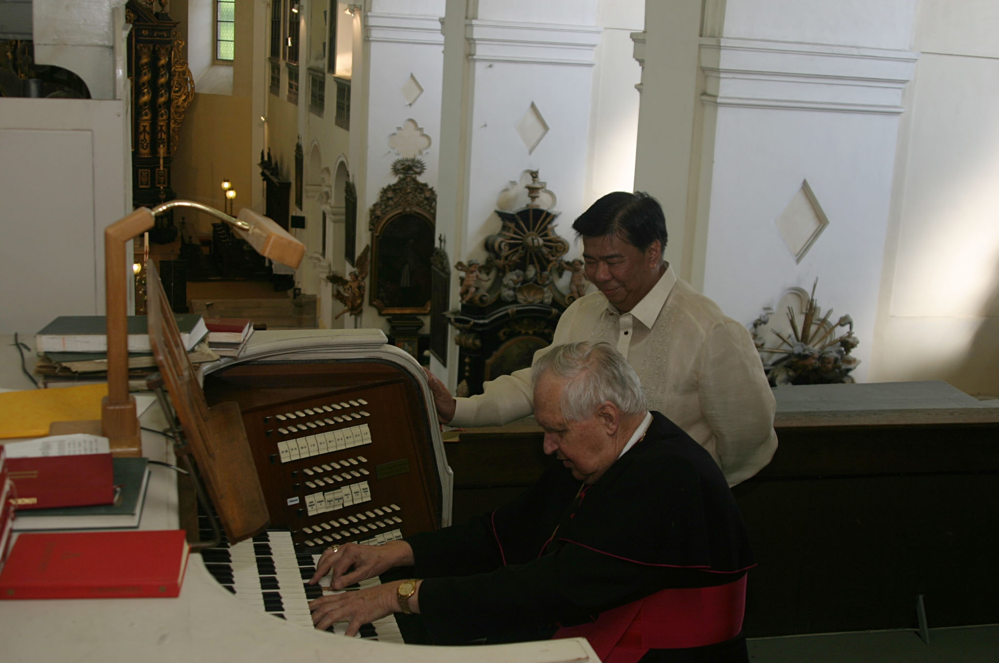 Biskup Josef Koukl hrál 4. května 2006 v katedrále návštěvě z Filipín na varhany